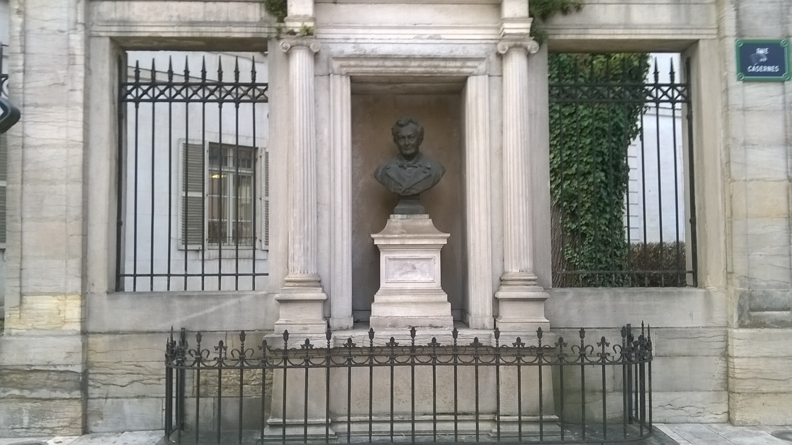 La statue du docteur Gevrey à Vesoul (Haute-Saône)